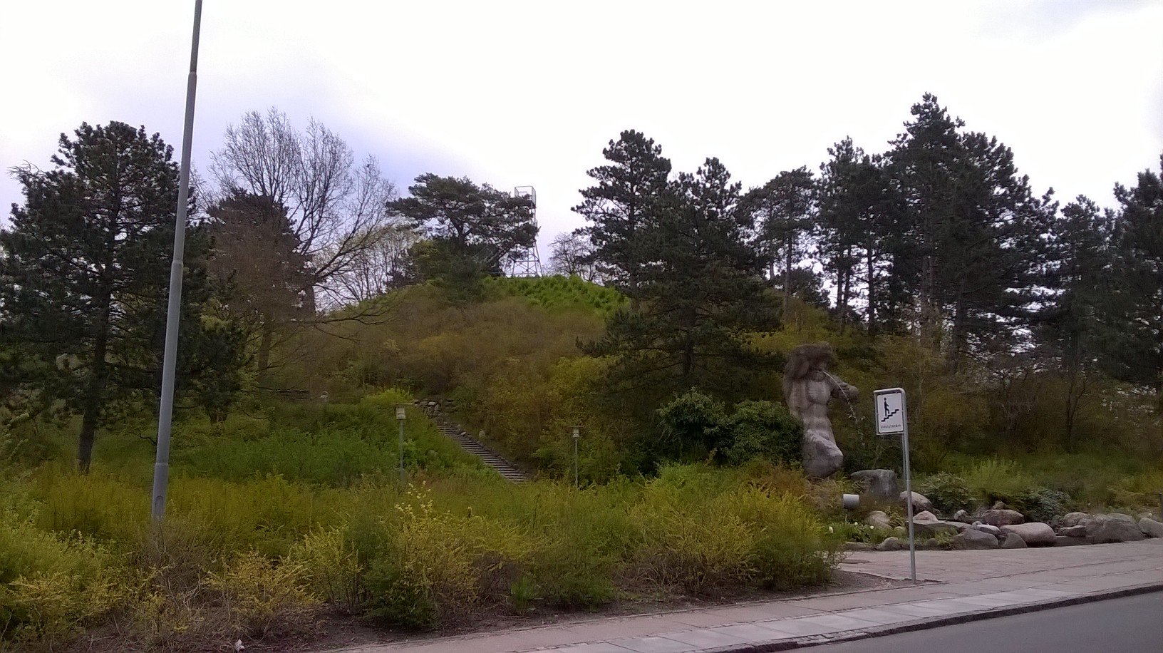 Parkområde i Næstved